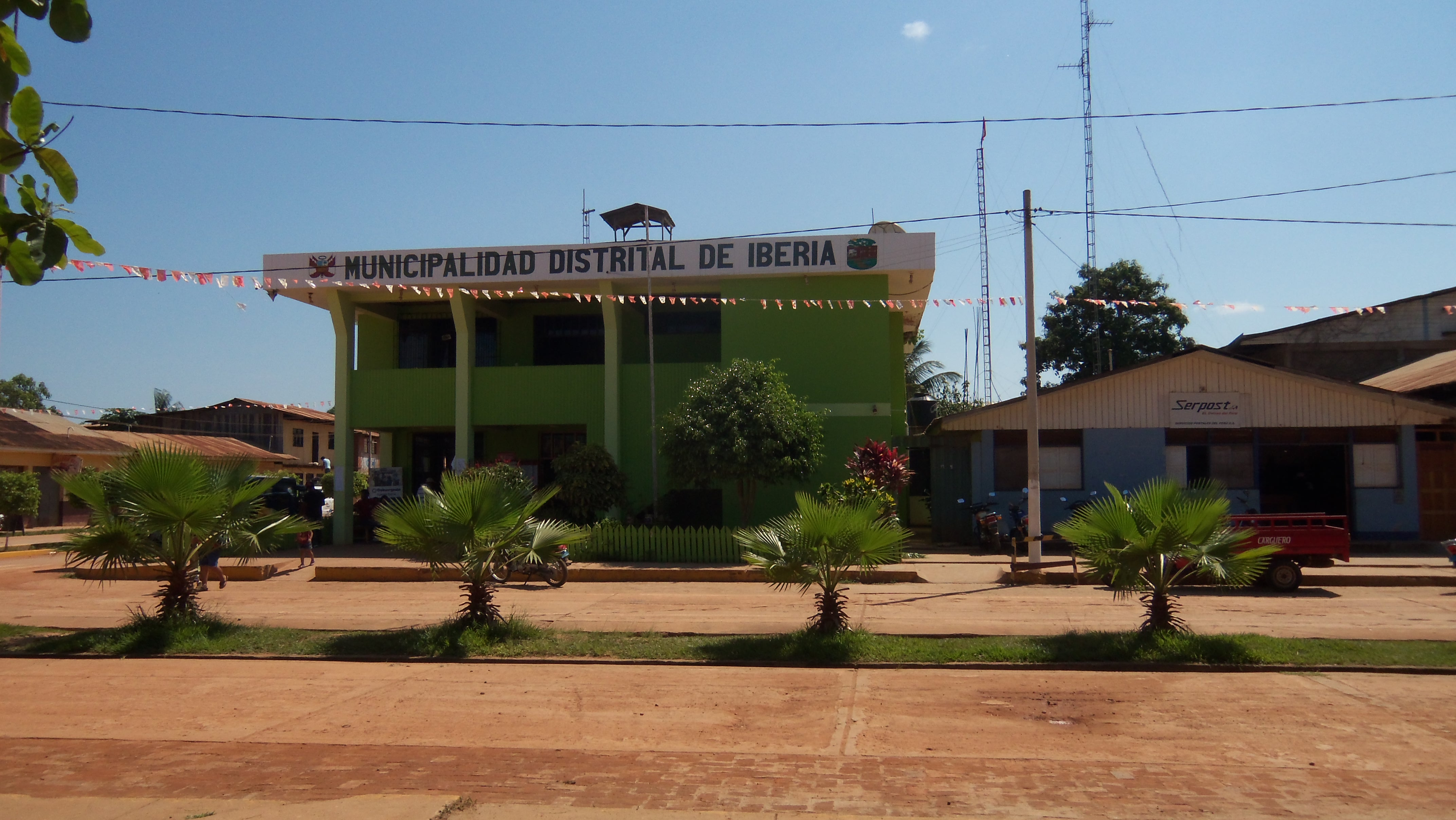 Local de la Municipalidad del Distrito de Iberia, ubicado en la Provincia de Tahuamanu, del Departamento de Madre de Dios, Perú